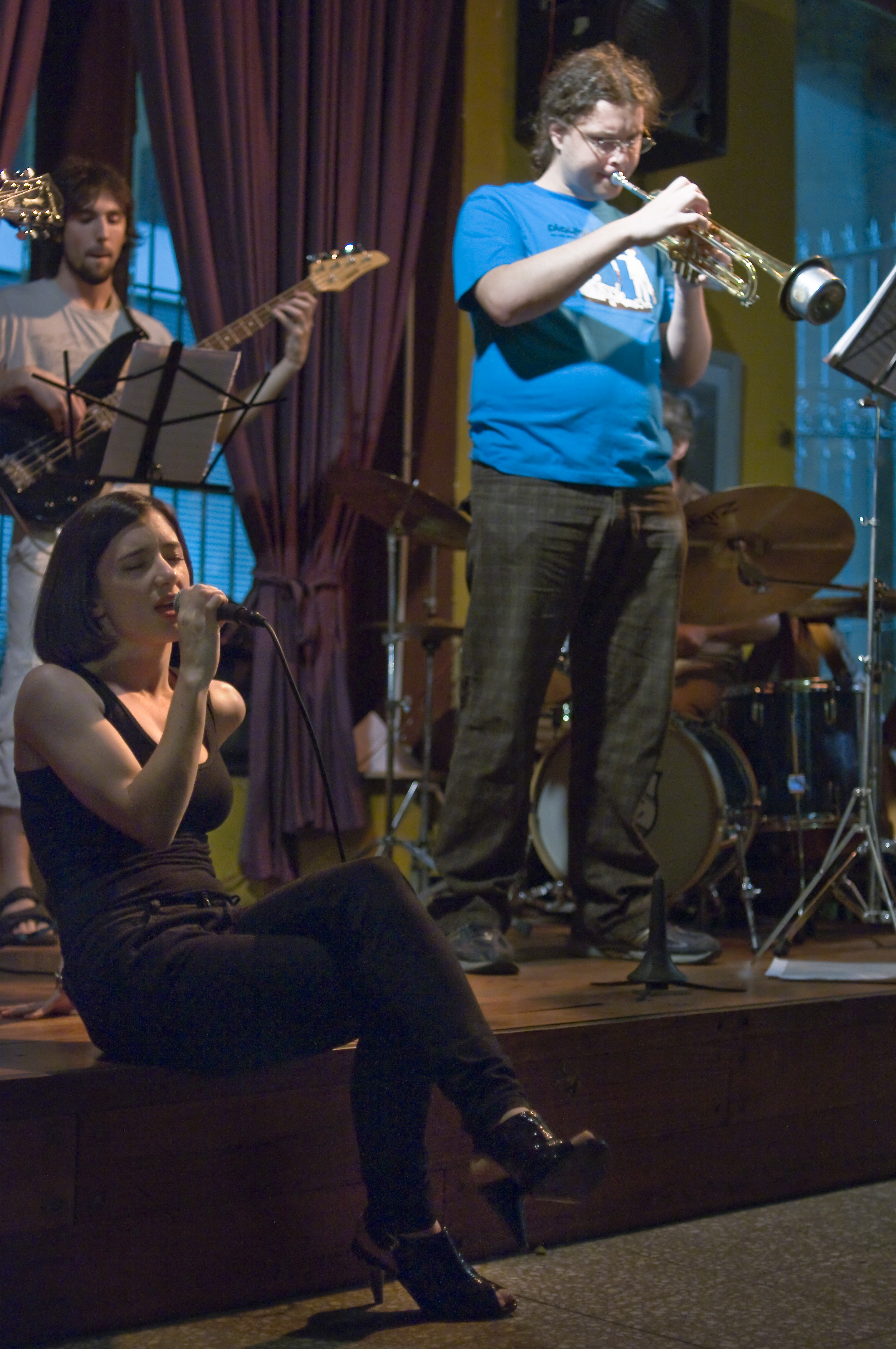 Malena Pichot Bartolomeo Bar Diciembre 2008